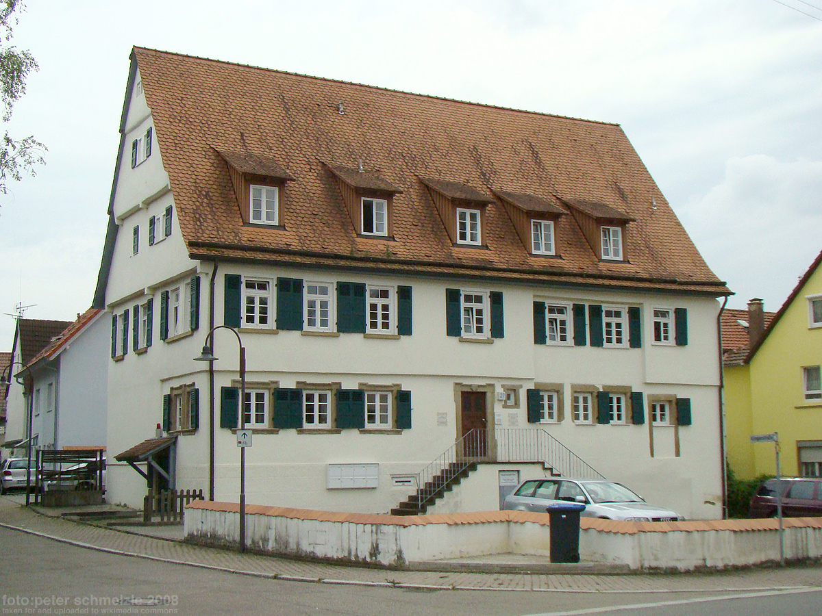 Denkmalgeschützter Erbhof in Heilbronn-Sontheim